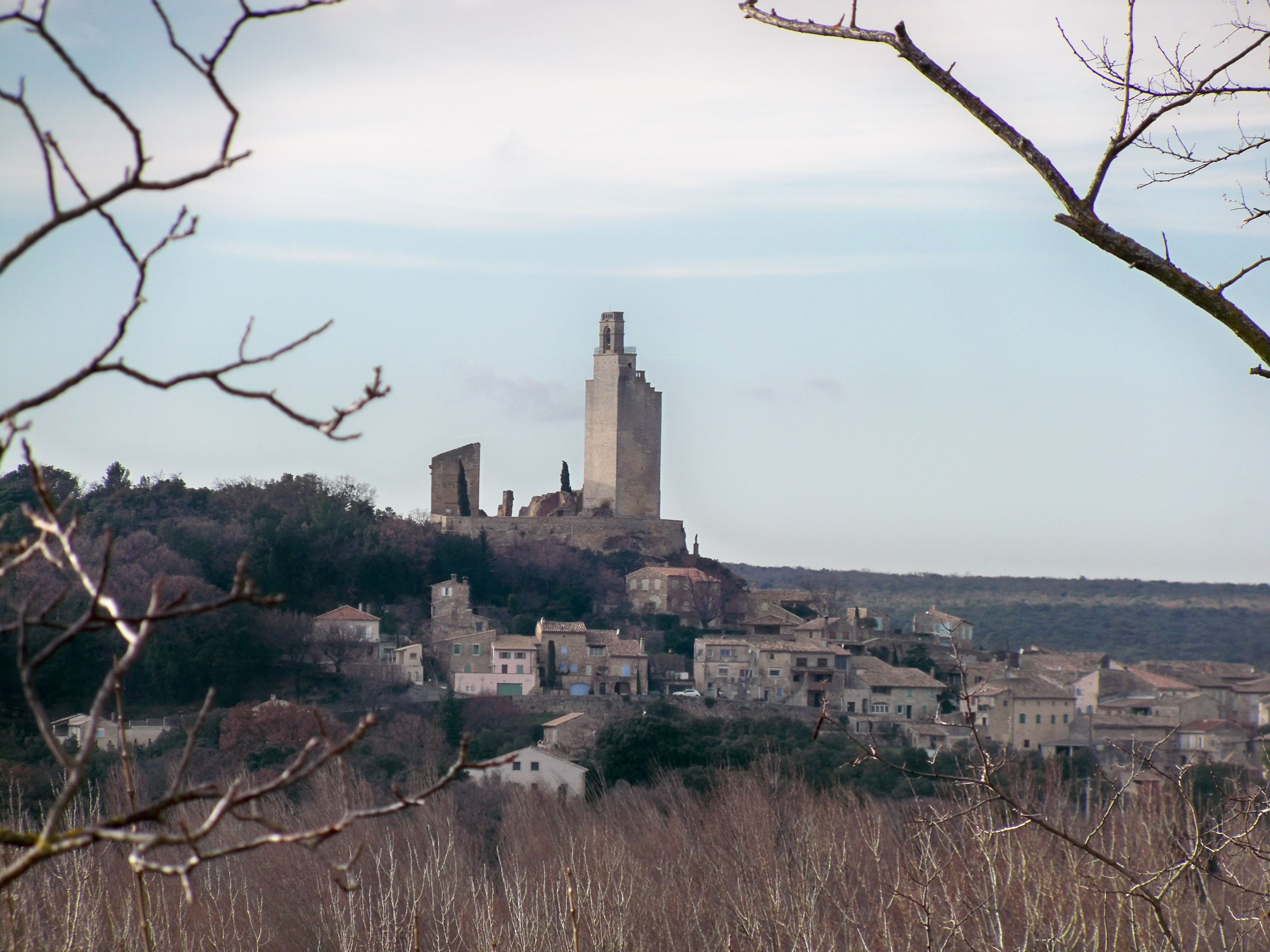 Tour de Chamaret (26)